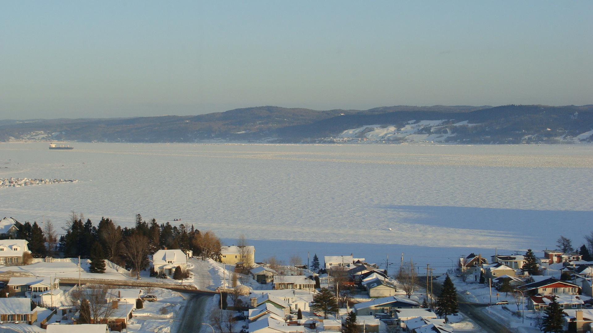 La Baie, au Saguenay (Québec, Canada) à l'hiver 2009.